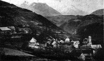 Quet-en-Beaumont (Isère) vue générale. Carte postale ancienne découpée.